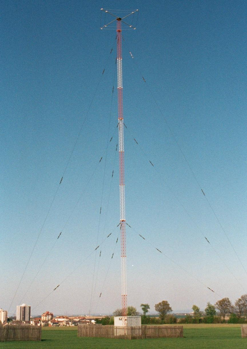 Selbststrahlender Sendemast mit Dachkapazität (Sendemast des Mittelwellensenders Hirschlanden der Deutschen Telekom AG für den AFN)